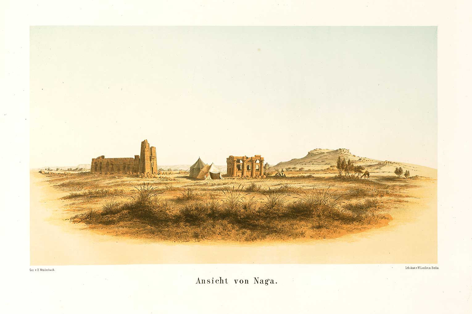 Denkmaeler aus Aegypten und Aethiopien nach den Zeichnungen der von Seiner Majestät dem Koenige von Preussen, Friedrich Wilhelm IV., nach diesen Ländern gesendeten, und in den Jahren 1842–1845 ausgeführten wissenschaftlichen Expedition auf Befehl Seiner Majestät